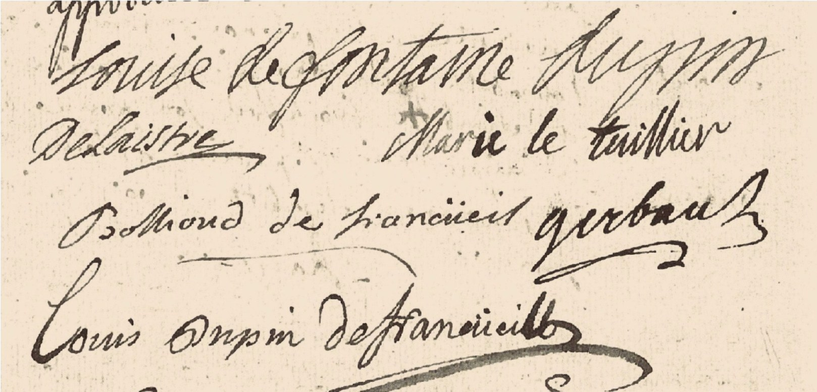 Signatures de madame Louise de Fontaine Dupin (1706-1799), épouse du fermier général Claude Dupin (1686-1769), propriétaires du château de Chenonceau, de son beau-fils : Louis-Claude Dupin de Francueil et son épouse Suzanne Bollioud de Saint-Julien (Bollioud de Francueil). Registres paroissiaux de Chenonceaux, église Saint-Jean-Baptiste, en date du 8 septembre 1740.